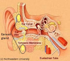 دو غده برون ریز در بدن